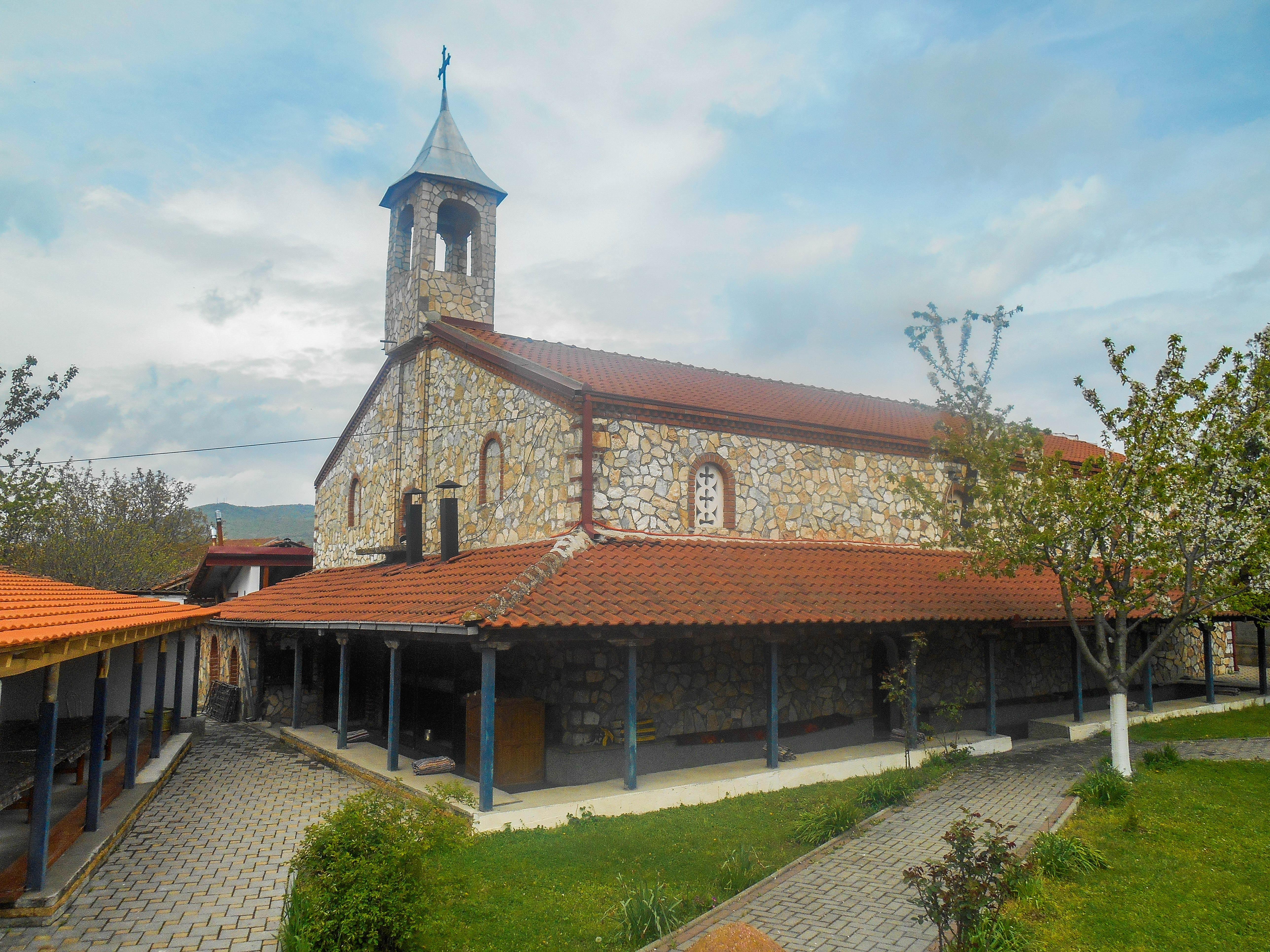 Црква Св. Димитриј